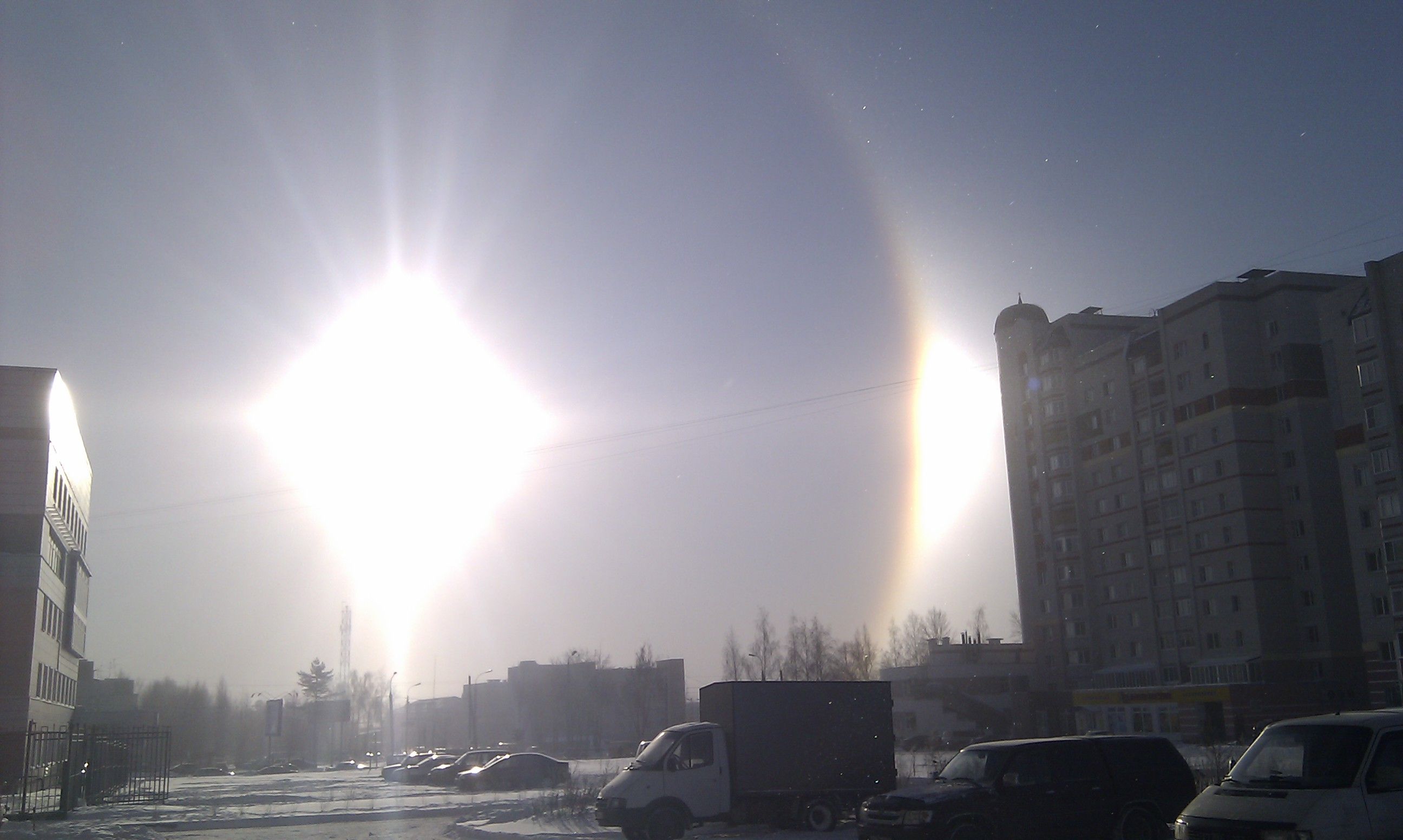 Гало в г. Брянске морозным утром